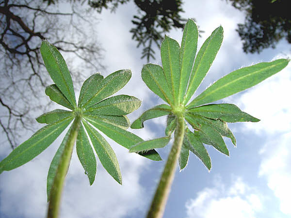 Lupinenblätter von unten